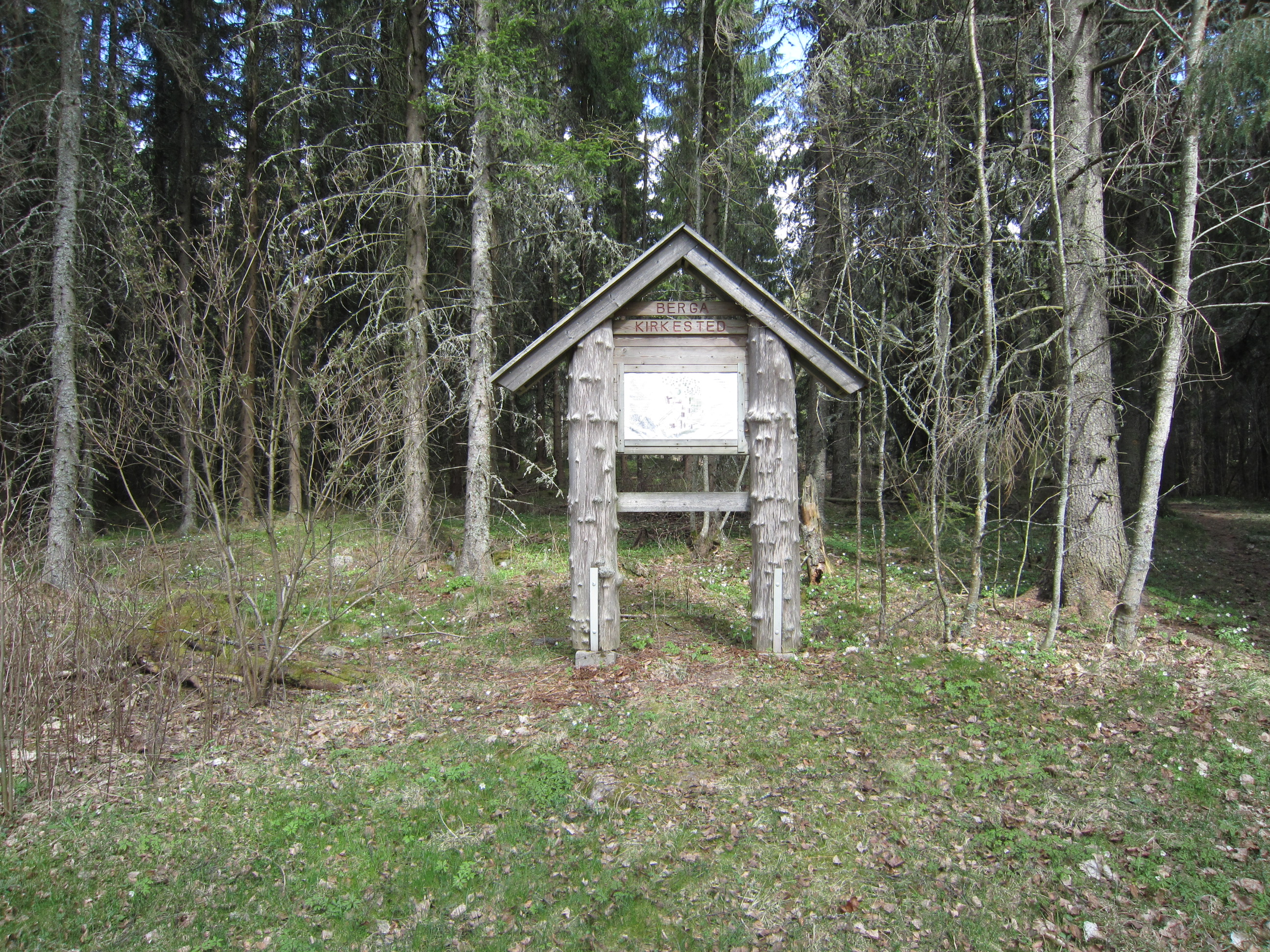 Berga eller Berger kirkested i Brandval